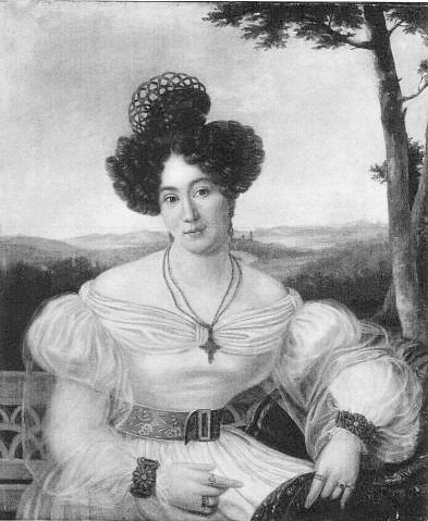 Wilhelmine Halberstadt (1776-1841), Deutsche Schriftstellerin und Pädagogin. Autor/Zeichner: unbekannter Künstler, wohl Kassel um 1835